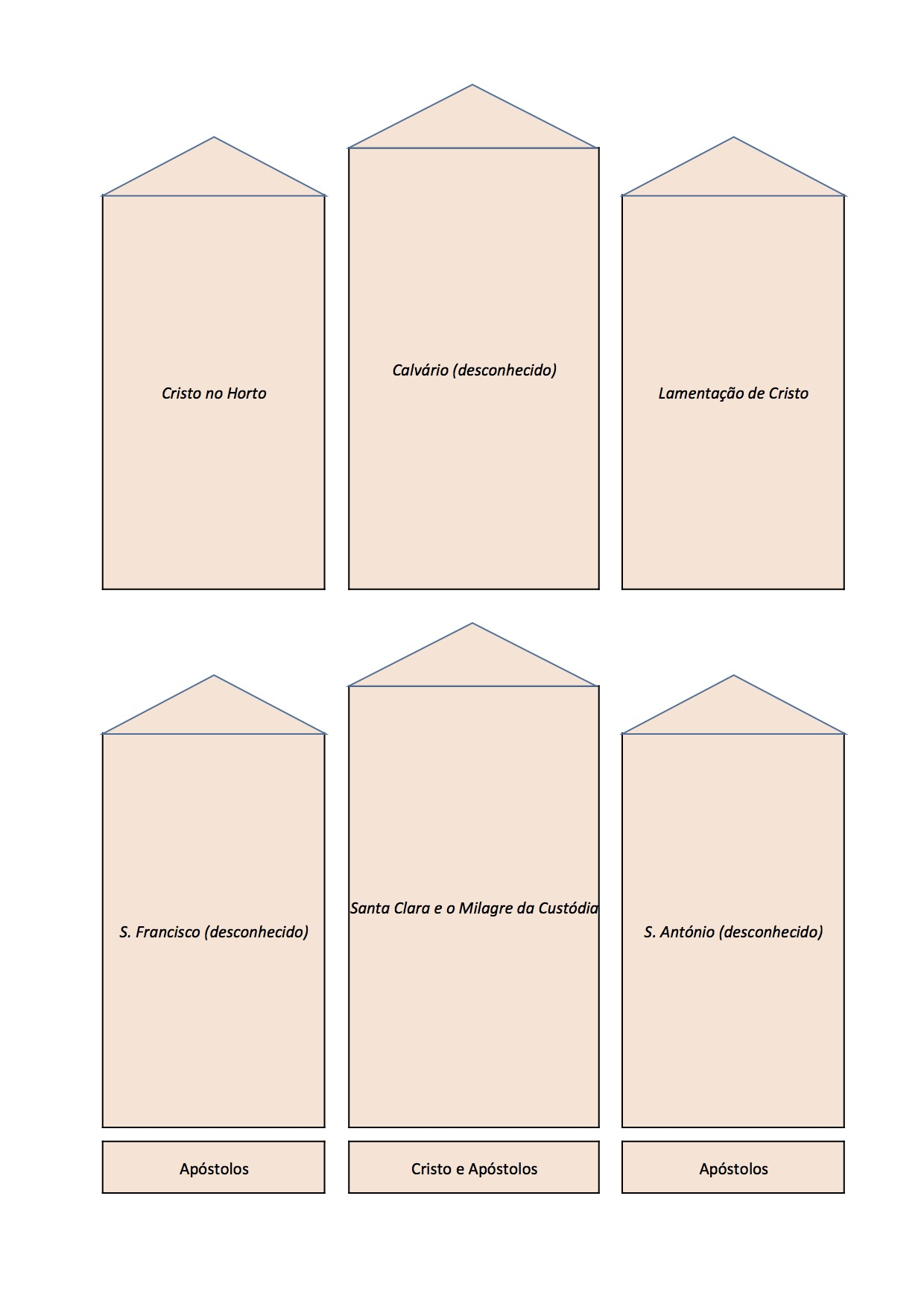 Reconstituição do Políptico de Santa Clara segundo Fernando B. Pereira Imagens e Histórias de devoção. Espaço, Tempo e Narrativa na Pintura Portuguesa do Renascimento (1450-1550), tese de doutoramento em Ciências da Arte, Faculdade de Belas Artes da U.L., policopiado, 2001, Volume II, pág. 40, citado por Virgínia Gomes em "O Tríptico de Santa Clara - antigas e novas questões", em As Preparações na Pintura Portuguesa Séculos XV e XVI", 2013, pag. 188-189, Actas do Colóquio Internacional em 28 e 29 de Junho de 2013.